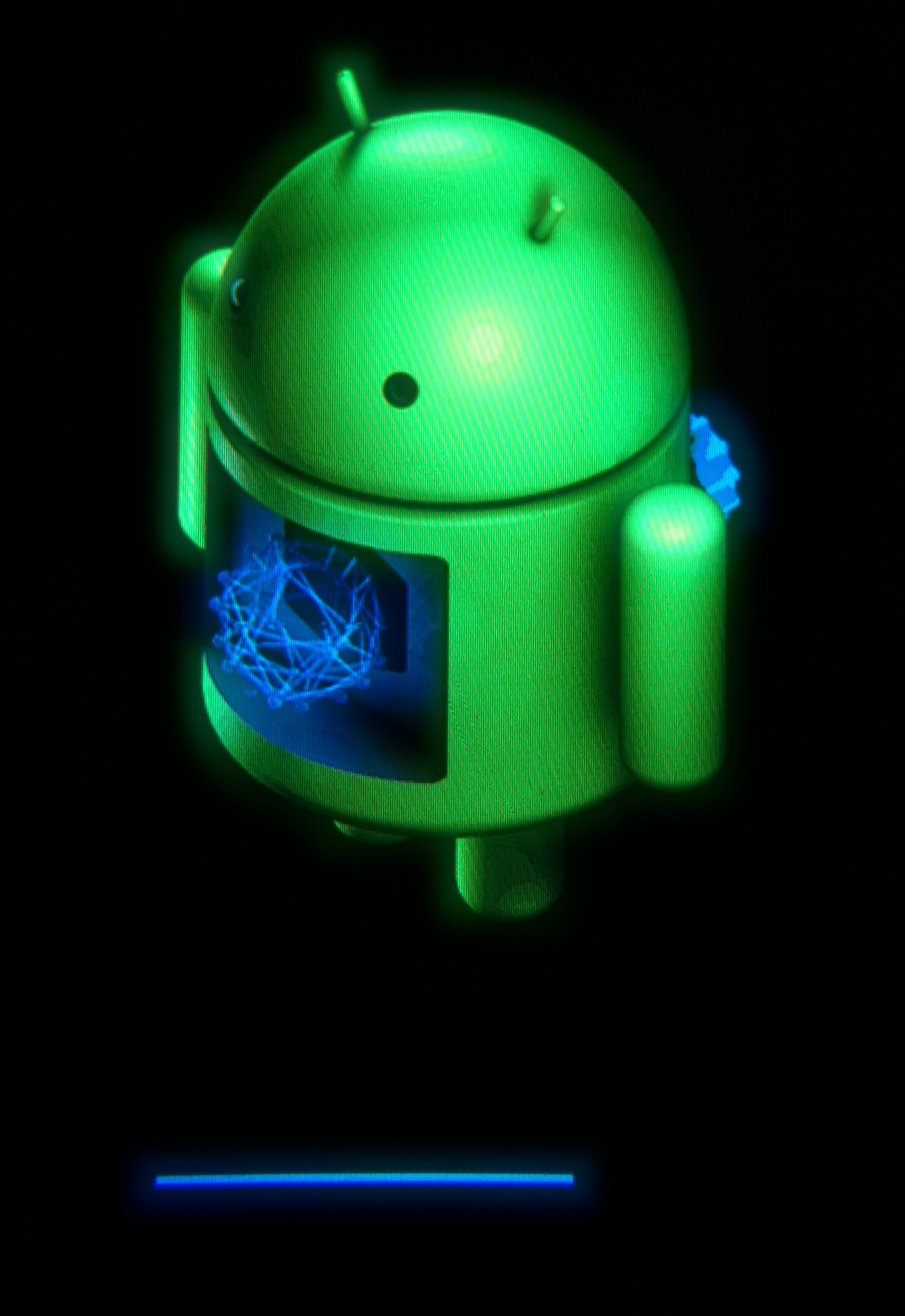 Android Update Screen auf von 4.0.3 auf 4.0.4 auf Smartphone